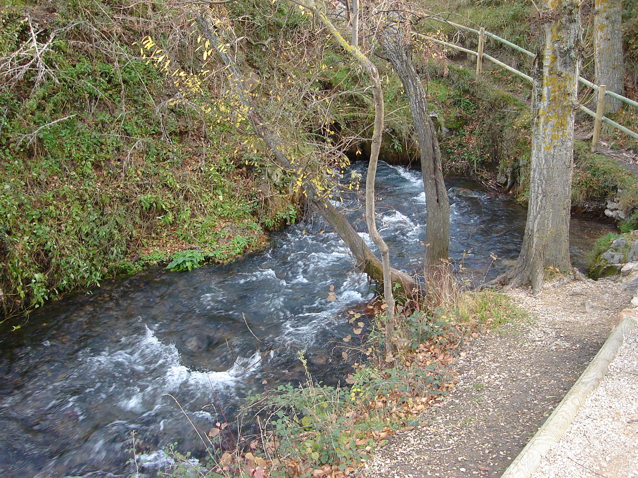 Río Queiles en su nacimiento en Vozmediano.